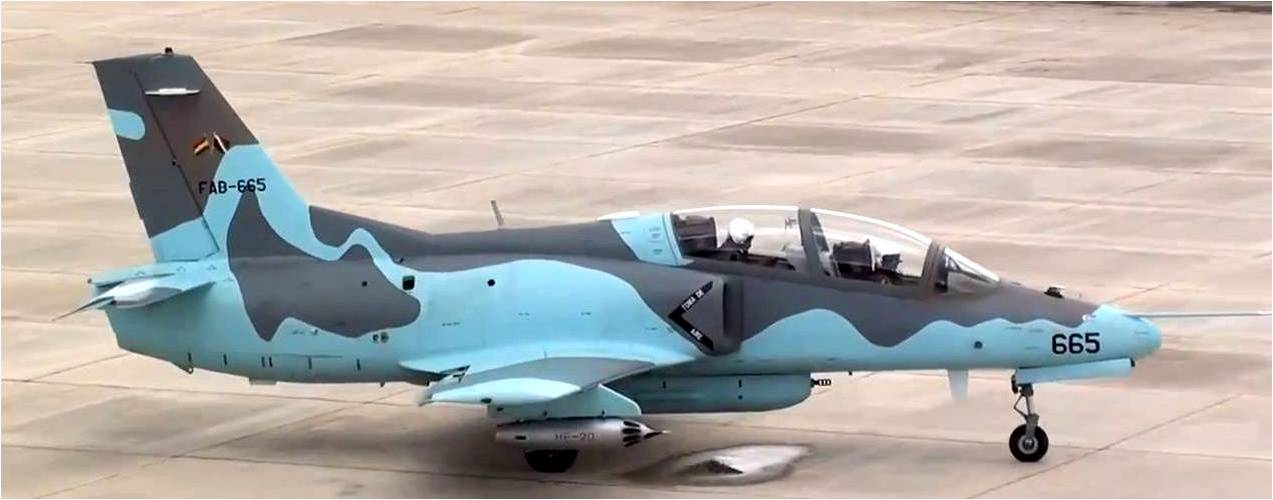 K-8 bol